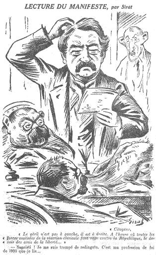 "Lecture du manifeste [de la Fédération des gauches], par Sirat. "Citoyens, le péril n'est pas à gauche, il est à droite. A l'heure où toutes les forces coalisées de la réaction cléricale font rage contre la République, le devoir des amis de la liberté..." - Sapristi, je me suis trompé de redingote. C'est ma profession de foi de 1903 que je lis...".